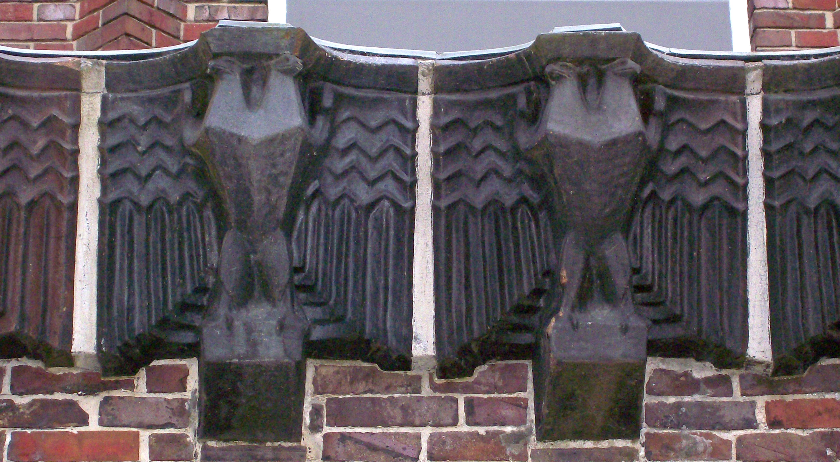 Holstentorhalle in Lübeck, Schleswig-Holstein, Germany, detail of entrance, für die letzeburgische WP bearbeitet von Benutzer:Cornischong